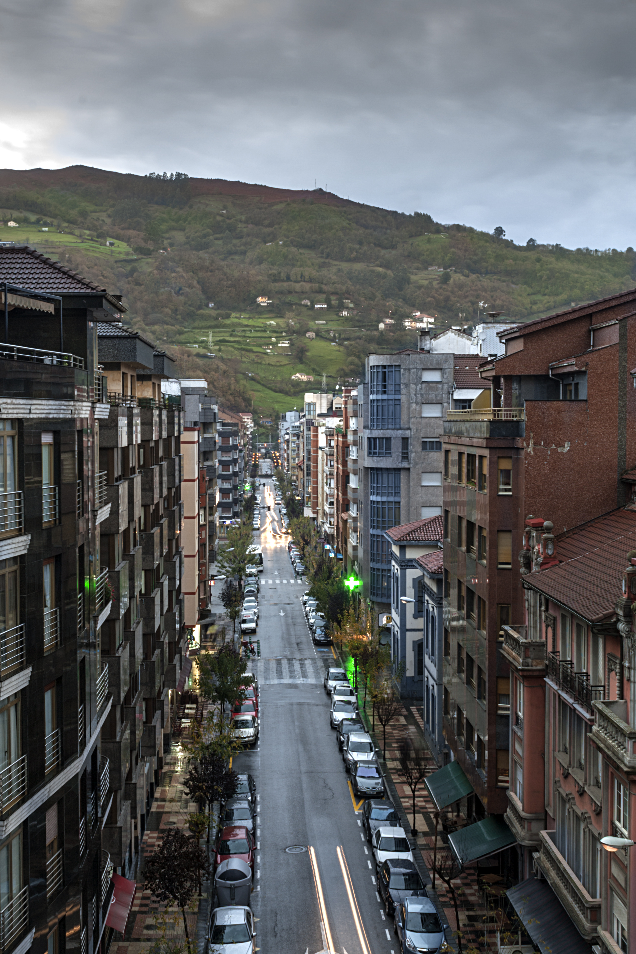 Calle Manuel Llaneza. Vista General.